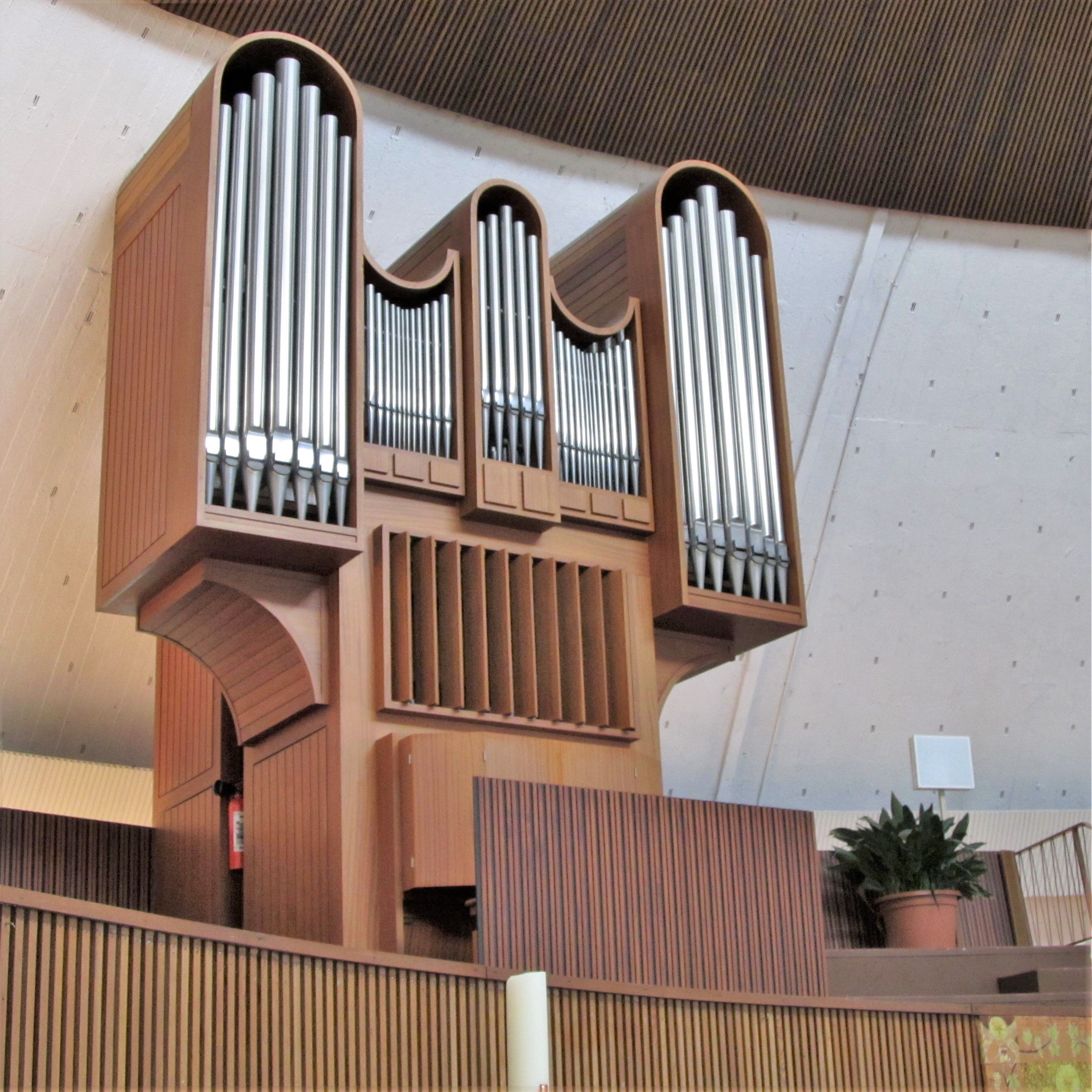 Orgelprospekt in der katholischen Pfarrkirche St. Fronleichnam in Homburg, Saarland